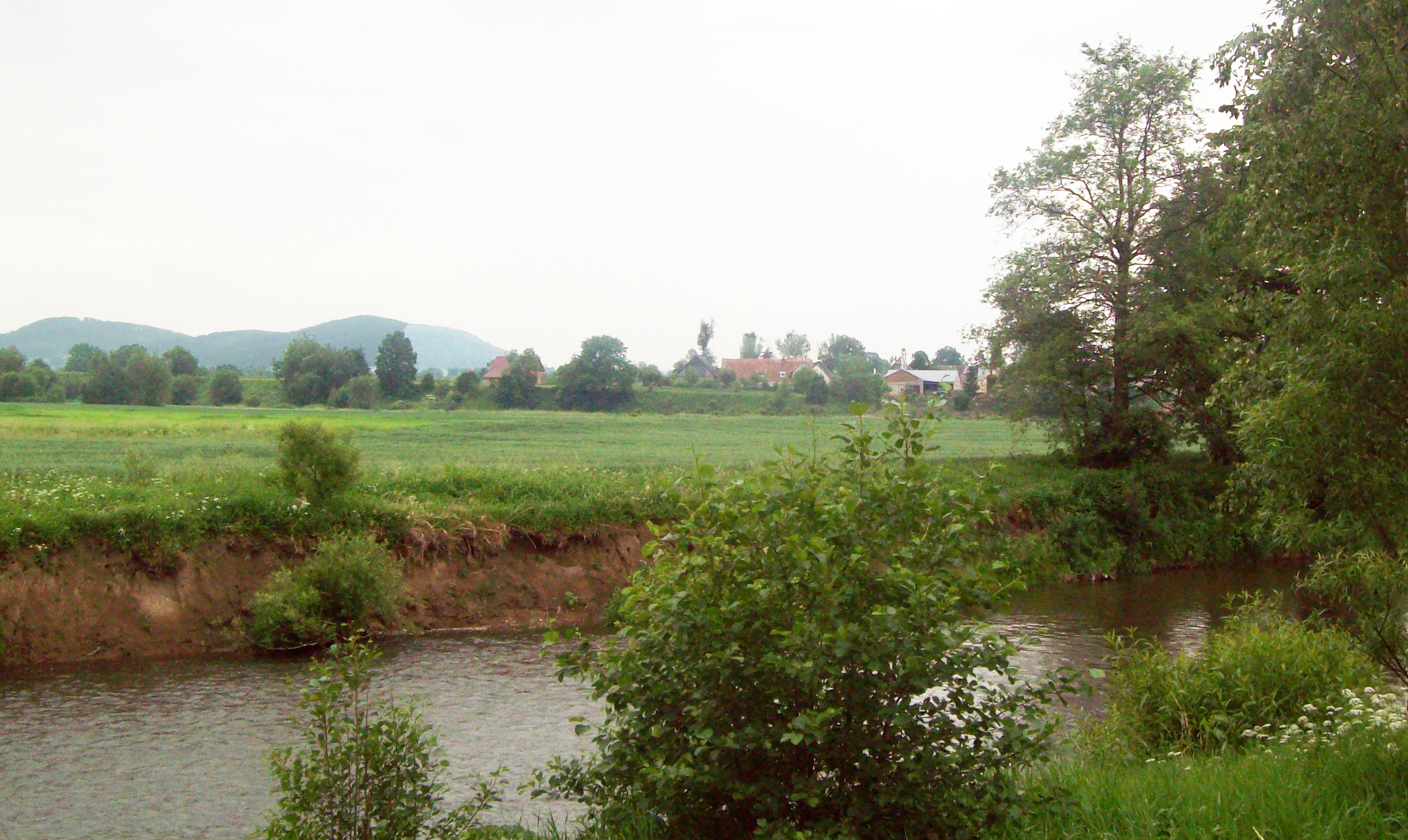 Nysa Kłodzka przepływająca przez granicą Zagórza (Kłodzko) i Pilicza (Krosnowice)